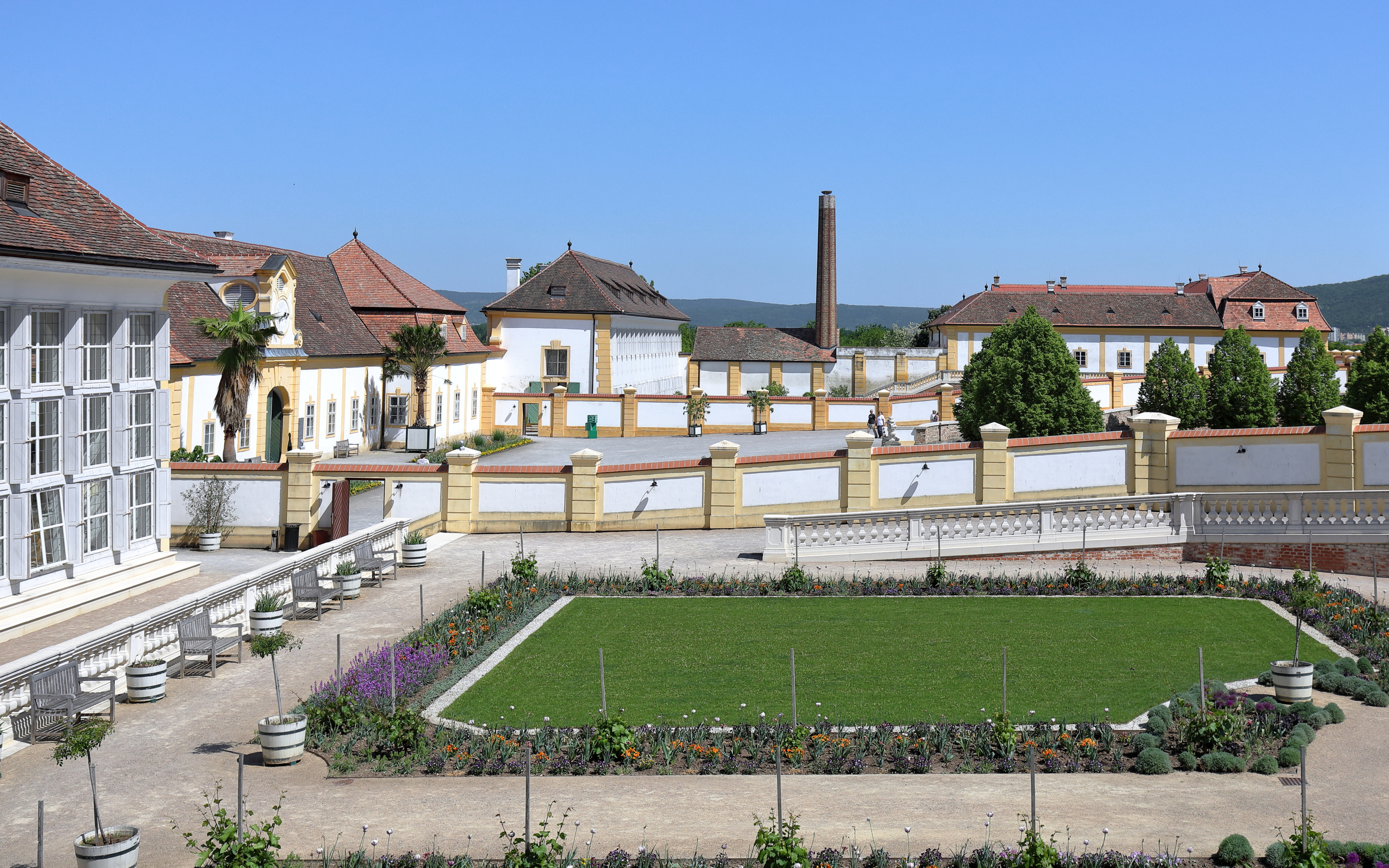 Der Gutshofkomplex und die Orangerien der Schlossanlage Schloss Hof in der niederösterreichischen Marktgemeinde Engelhartstetten. Die Schlossanlage wurde um 1627 auf einer Geländekante und östlich der mittelalterlichen Feste Hof errichtet. Nachdem 1725 Prinz Eugen die Anlage erworben hatte, baute er diese zu einem repräsentativen Landsitz aus. 1755 kam das Schloss in den Besitz von Maria Theresia. Von 1773 bis 1775 erfolgte dann ein Um- und Ausbau zum heutigen Erscheinungsbild durch Franz Anton Hillebrandt.